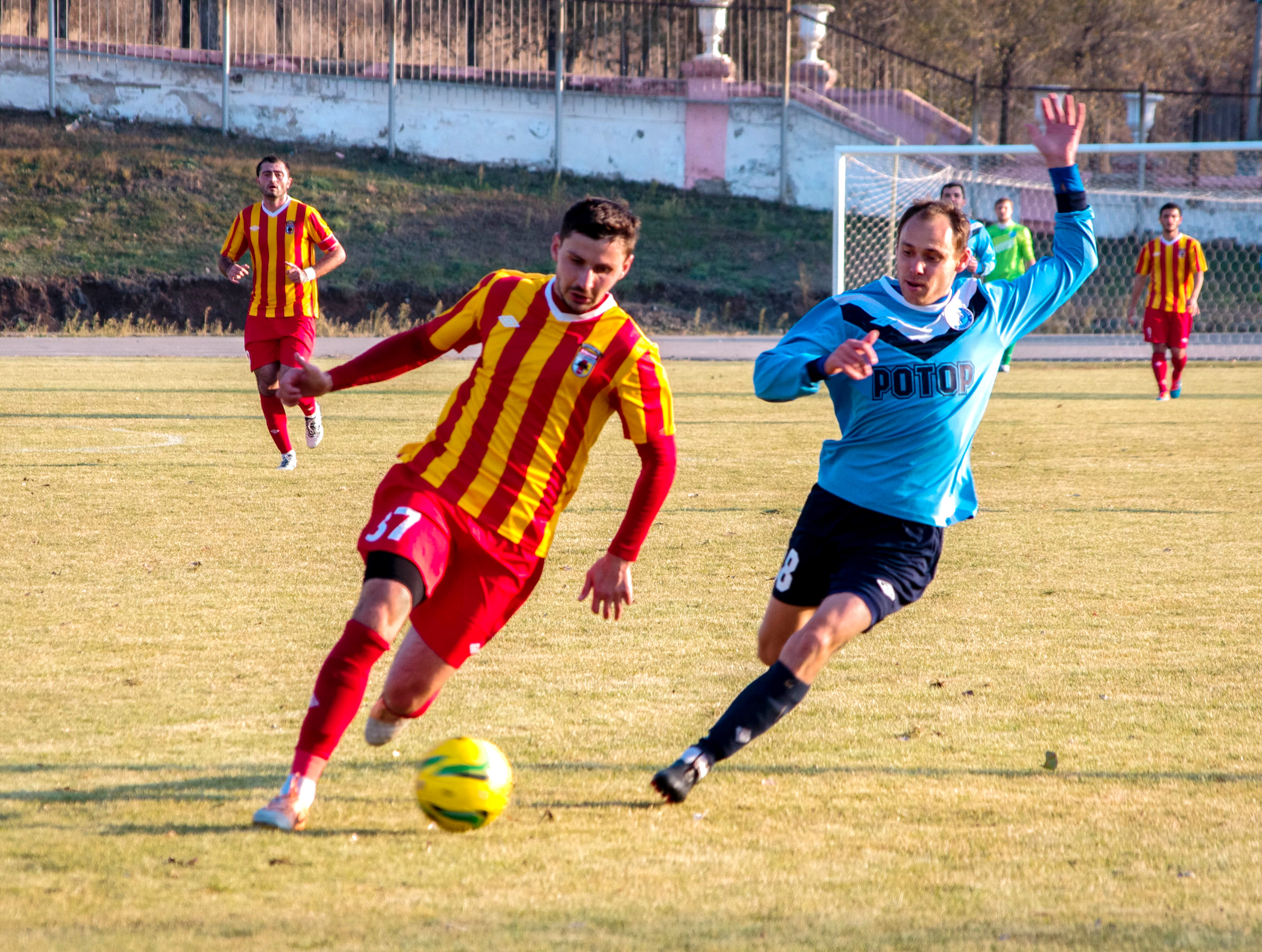 Алан Дзуцев (с мячом) и Денис Клюев в матче «Ротор» - «Алания»